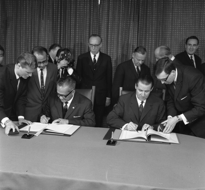 Unterzeichnung eines Kapitalhilfeabkommens BRD - Malaysia (vorne v.l.n.r.: Der malaysische Botschafter Dato Abdul Hamid bin Haji Jumat, Bundesaußenminister Dr. Schröder, im Auswärtigen Amt) Bonn